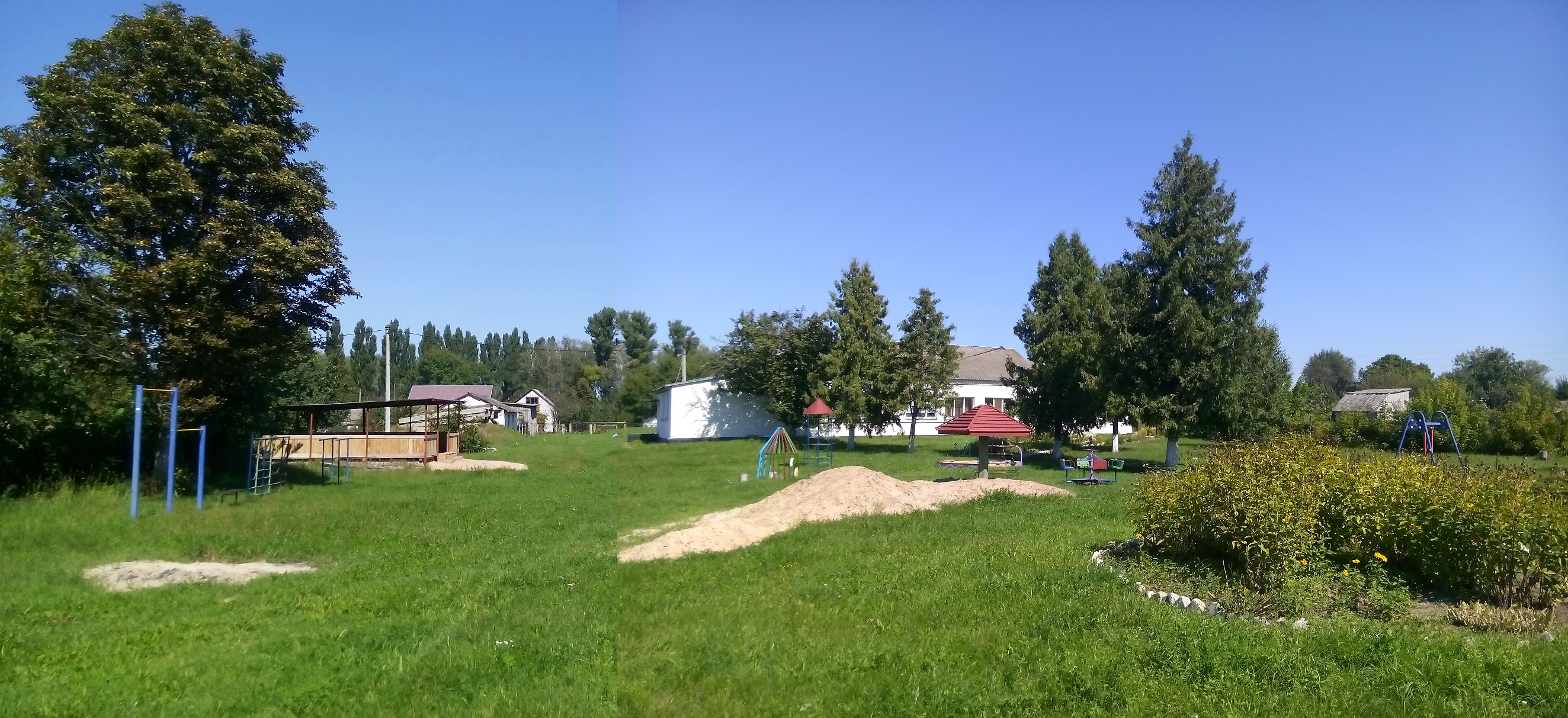 Дитячий садок "Казка". Село Марківці, Бобровицький район, Чернігівська область.